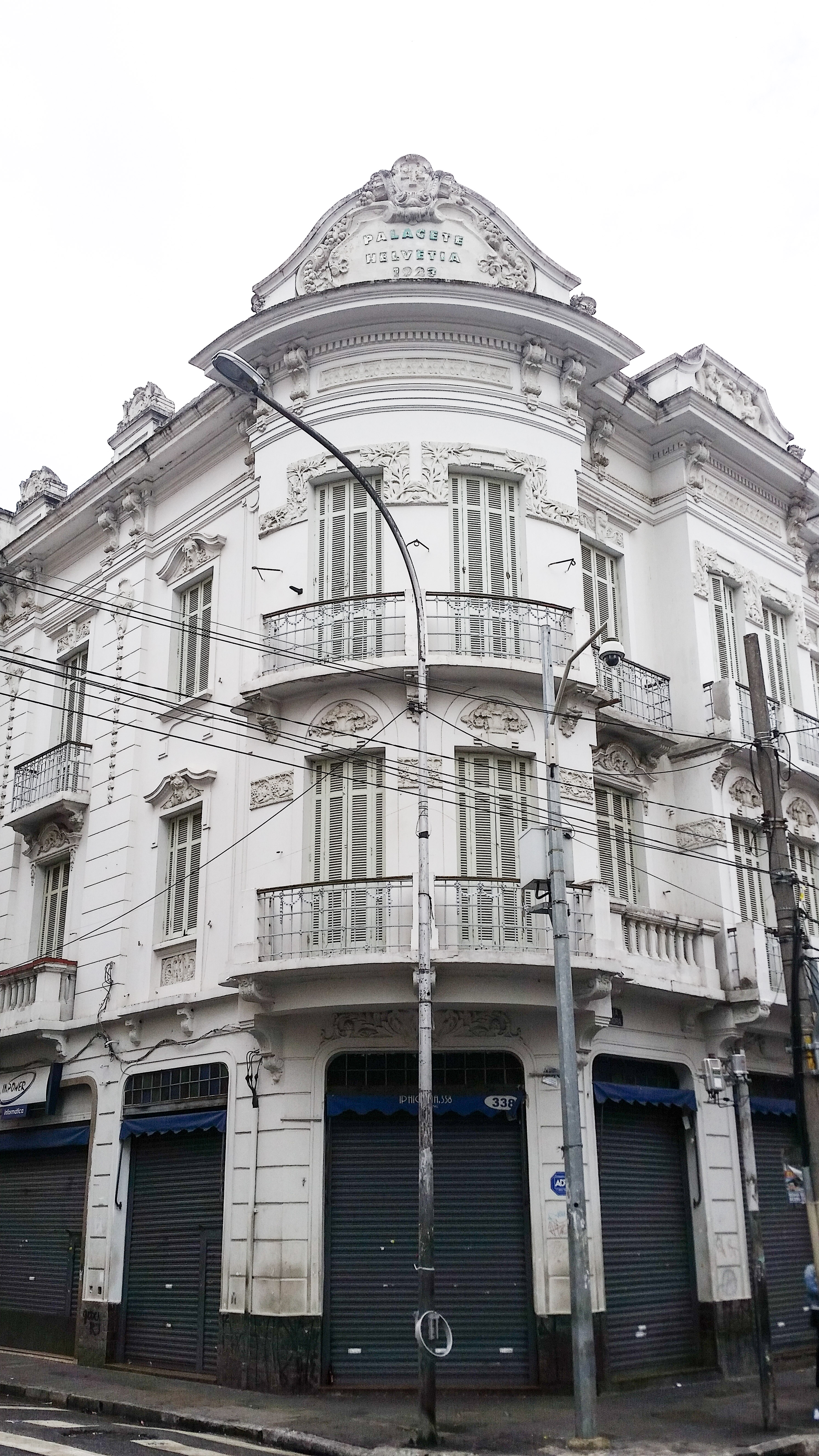 Esquina do Palacete com vista da rua, em São Paulo (SP)